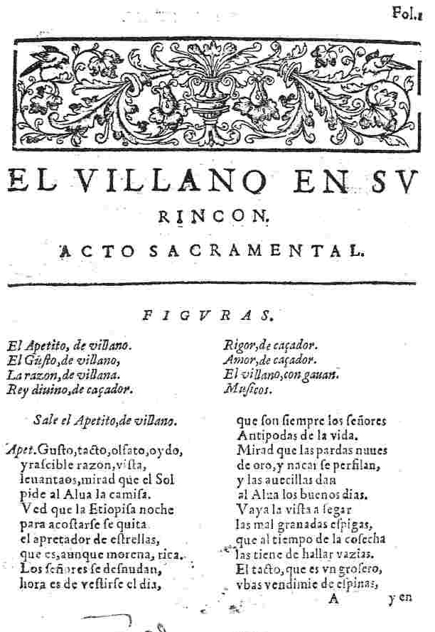 Portada de José de Valdivieso, «El villano en su rincón. Auto sacramental», en Doce autos sacramentales y dos comedias divinas, Toledo, Juan Ruiz; a costa de Martín Vázquez de la Cruz, 1622, fols. 1-12. Ficha catalográfica en la biblioteca digital de la Universidad Complutense de Madrid. Leyenda El villano en su / rincón. / Acto sacramental. / Figuras. / El Apetito, de villano./ El Gusto, de villano,/ La razón, de villana./ Rey divino, de cazador./ Rigor, de cazador./ Amor, de cazador./ El villano, con gabán./ Músicos.// Sale el Apetito de villano.// Apet. Gusto, tacto, olfato, oído,/ irascible razón, vista,/ levantaos, mirad que el sol/ pide al alba la camisa./ Ved que la etiópi[c]a noche/ para acostarse se quita/ el apretador de estrellas,/ que es, aunque morena, rica./ Los señores se desnudan,/ hora es de vestirse el día,/ que son siempre los señores/ antípodas de la vida./ Mirad que las pardas nubes,/ de oro y nácar se perfilan,/ y las avecillas dan/ al alba los buenos días./ Vaya la vista a segar/ las mal granadas espigas,/ que al tiempo de la cosecha,/ las tiene de hallar vacías./ El tacto, que es un grosero,/ uvas vendimie de espinas